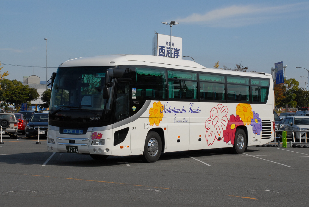 撮影場所失念